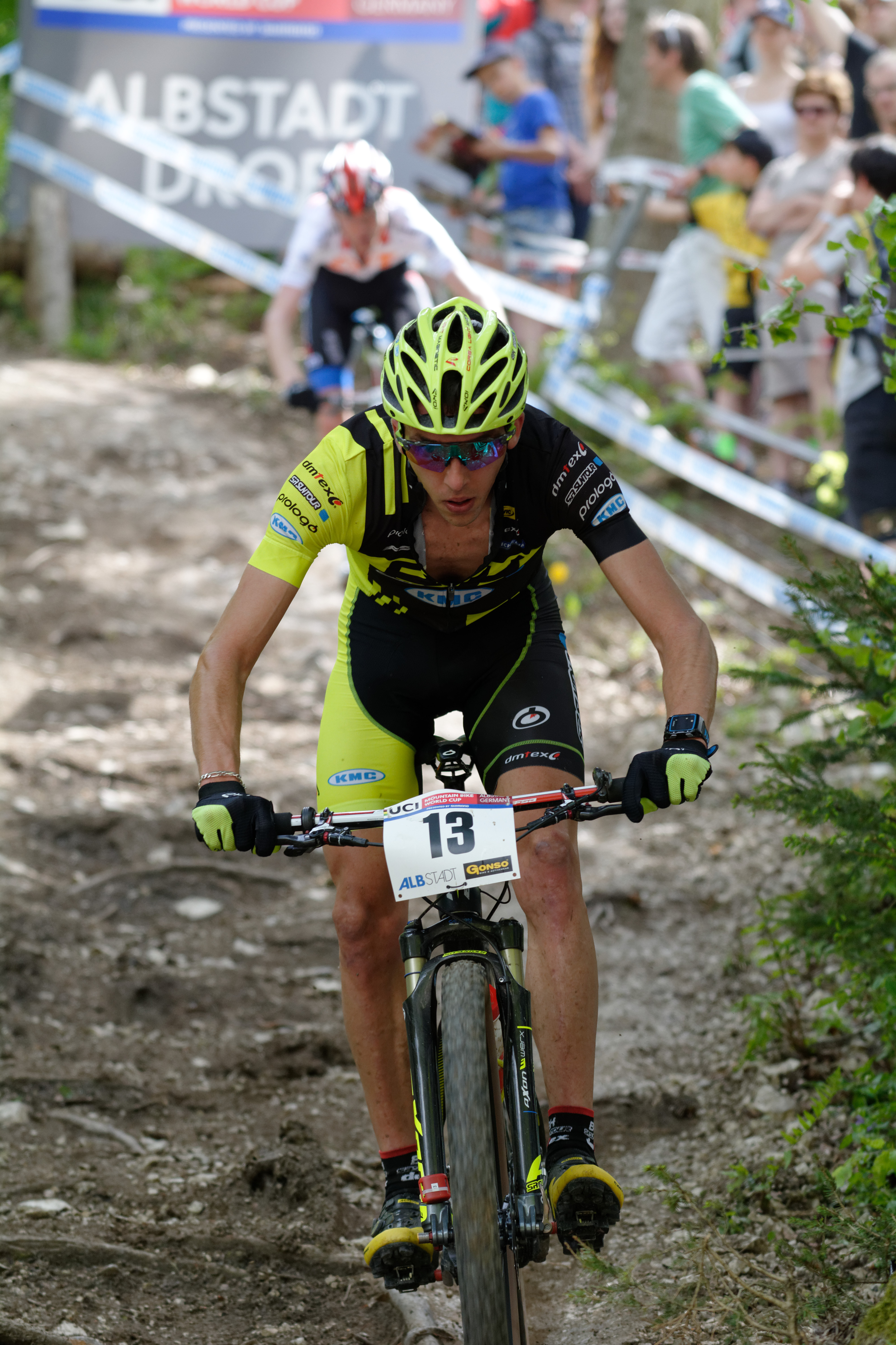 D71_7109_DxO